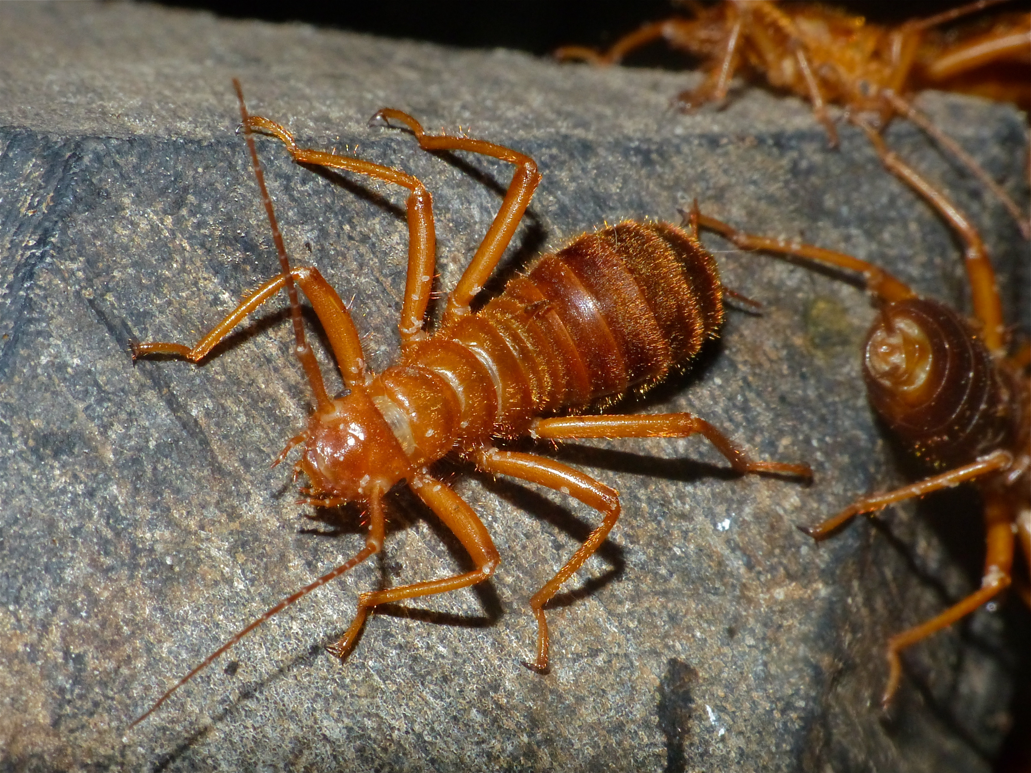 Deer Cave, Mulu NP, Sarawak, MALAYSIA